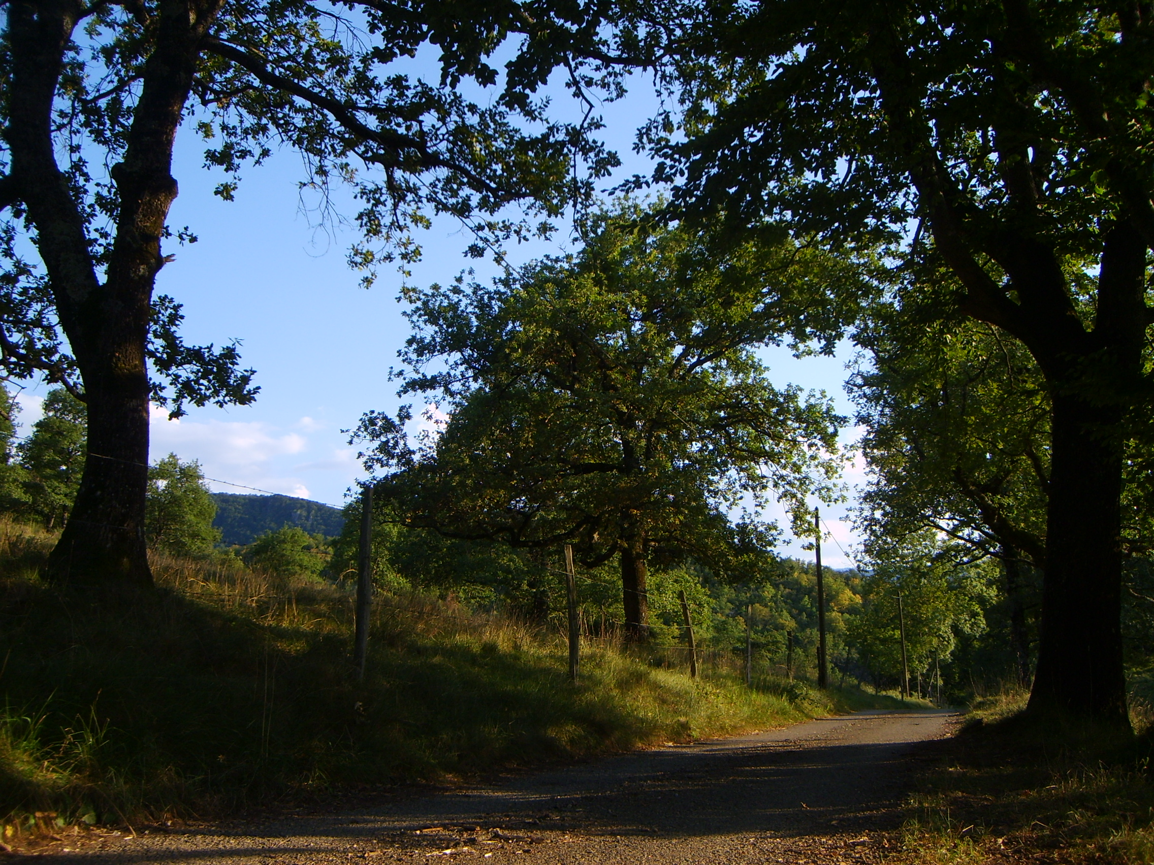 Saint-Girons - La Pale